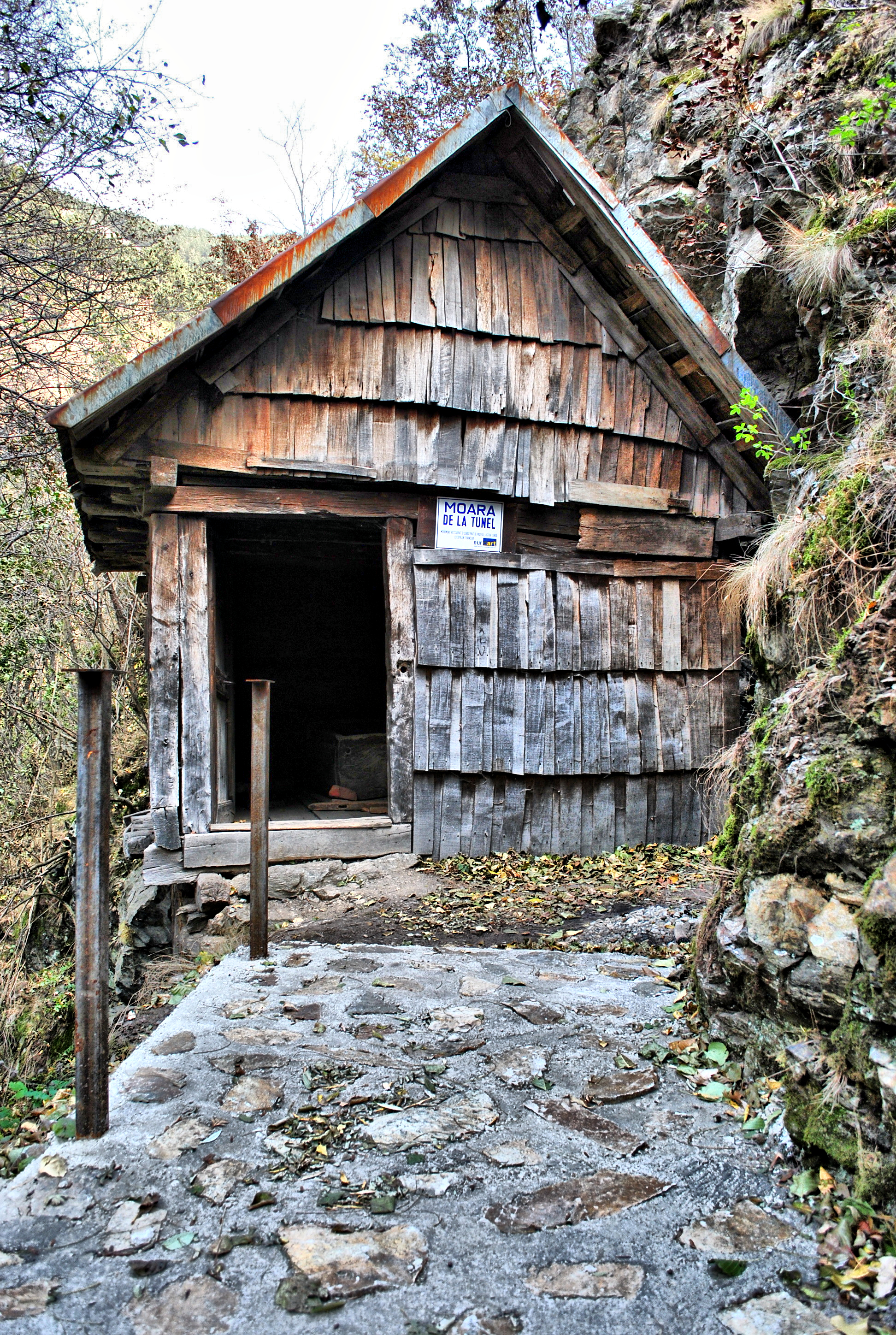 Moara de la Tunel 12